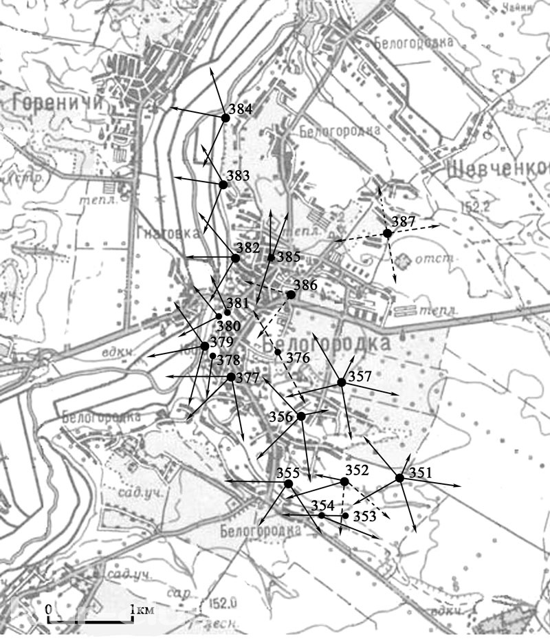 Схема БРО 20 Київського укріпленого району, викладена у вільний доступ авторами книги "Киевский укрепленный район 1928—1941" (